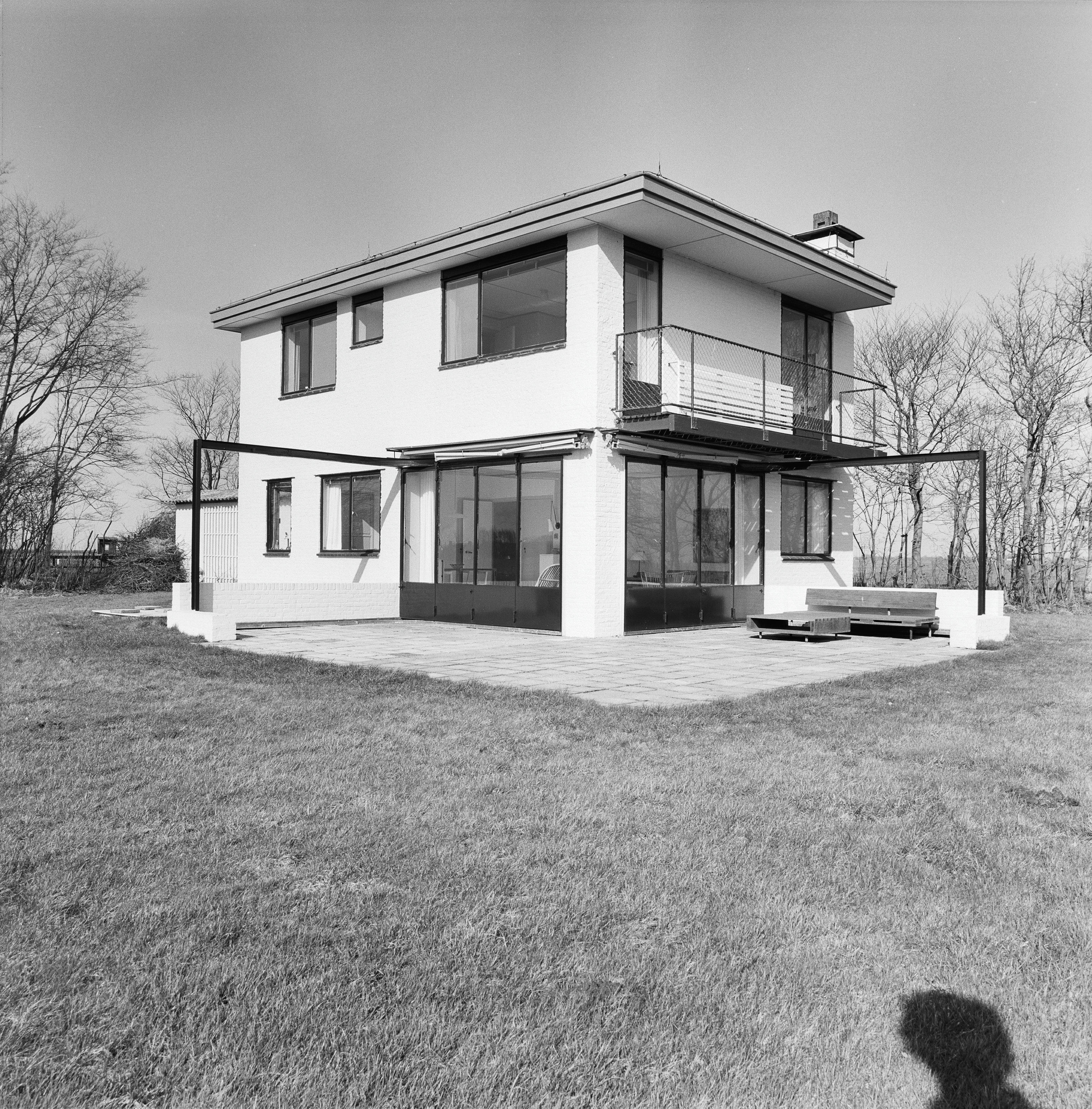 zij- en achtergevel